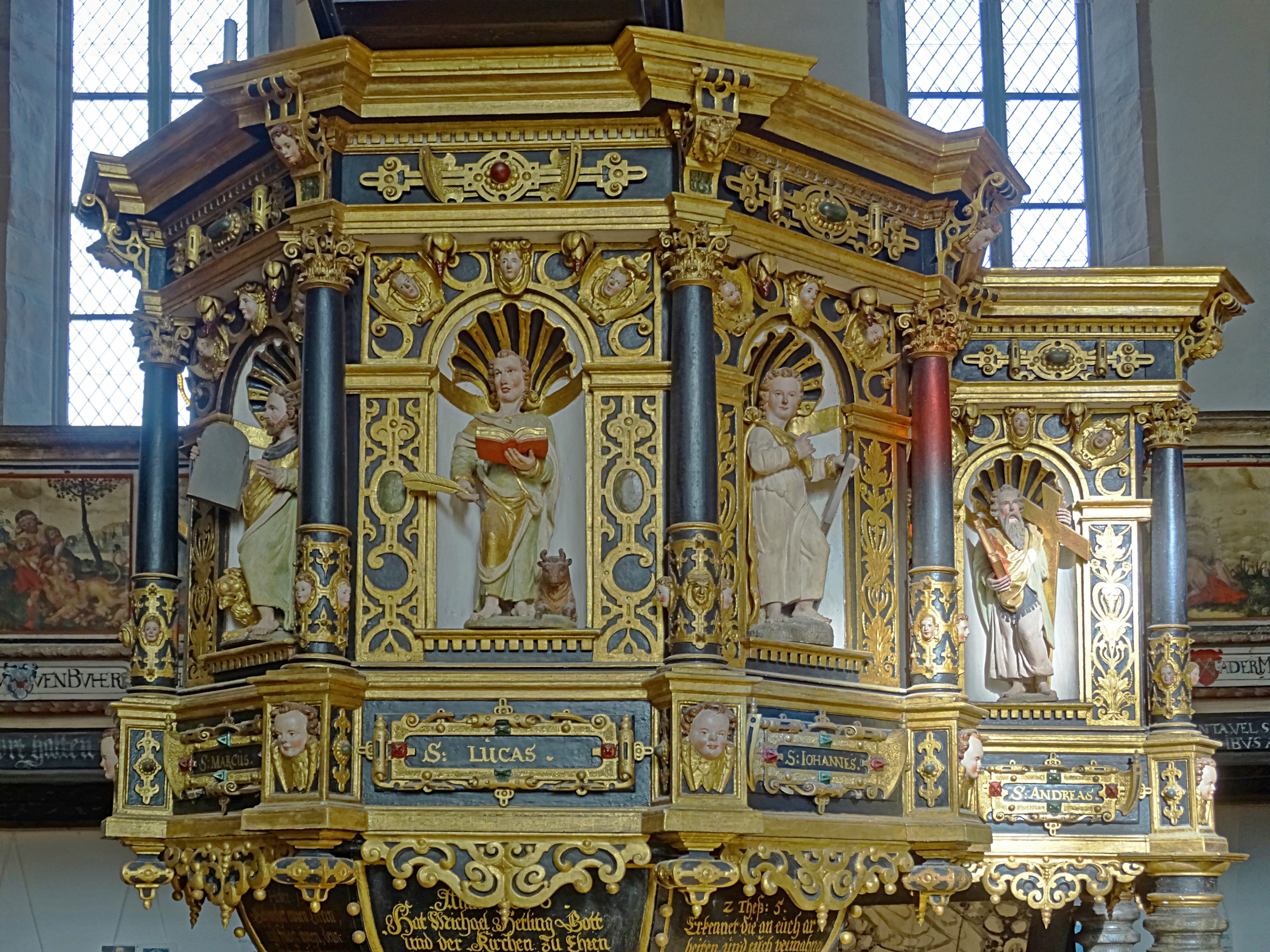 Renaissance-Kanzel (1570), mit den Hl.Marcus, Lucas, Johannes, Andreas in St. Stephani (Osterwieck)